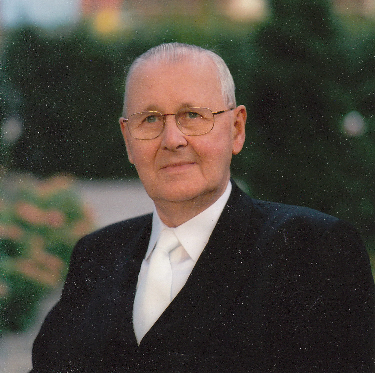 Ds Frans Mallan